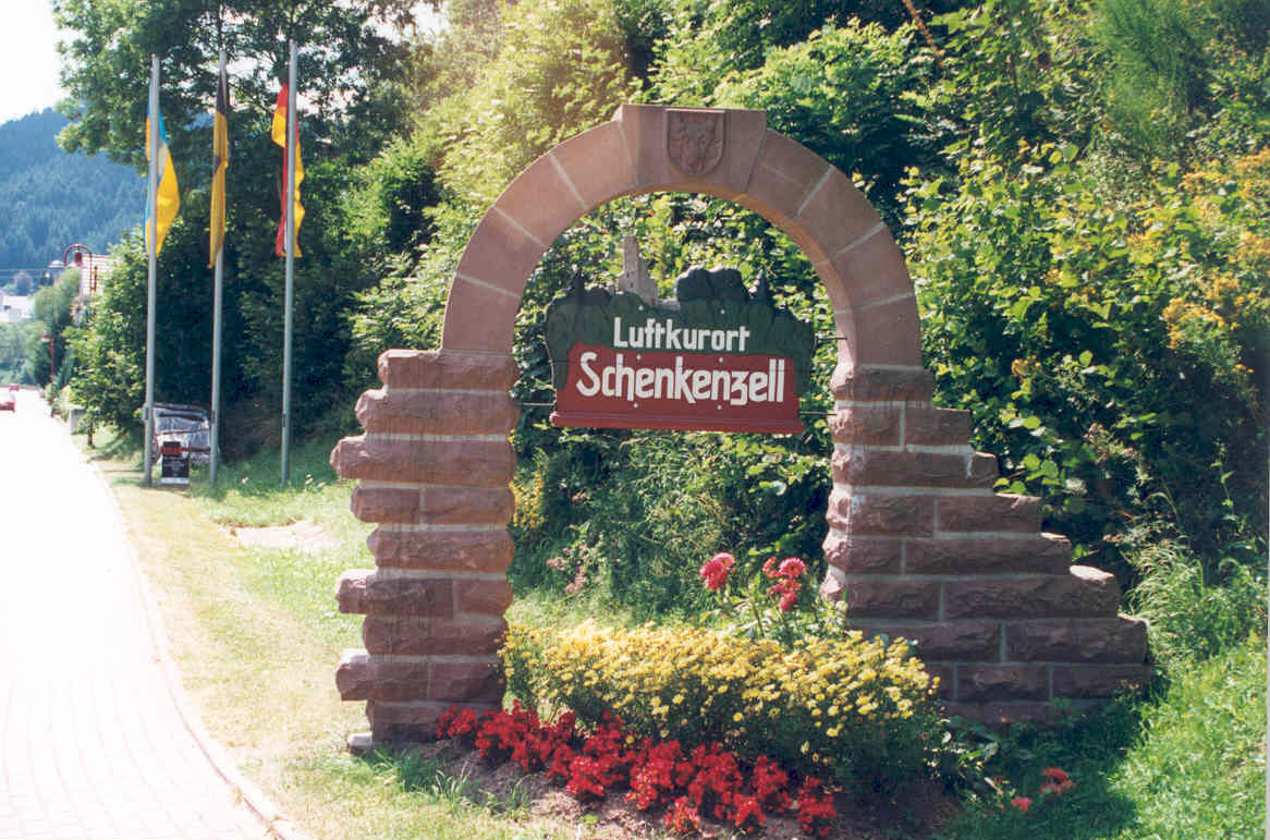 Schenkenzell, Ortseingangsbeschilderung